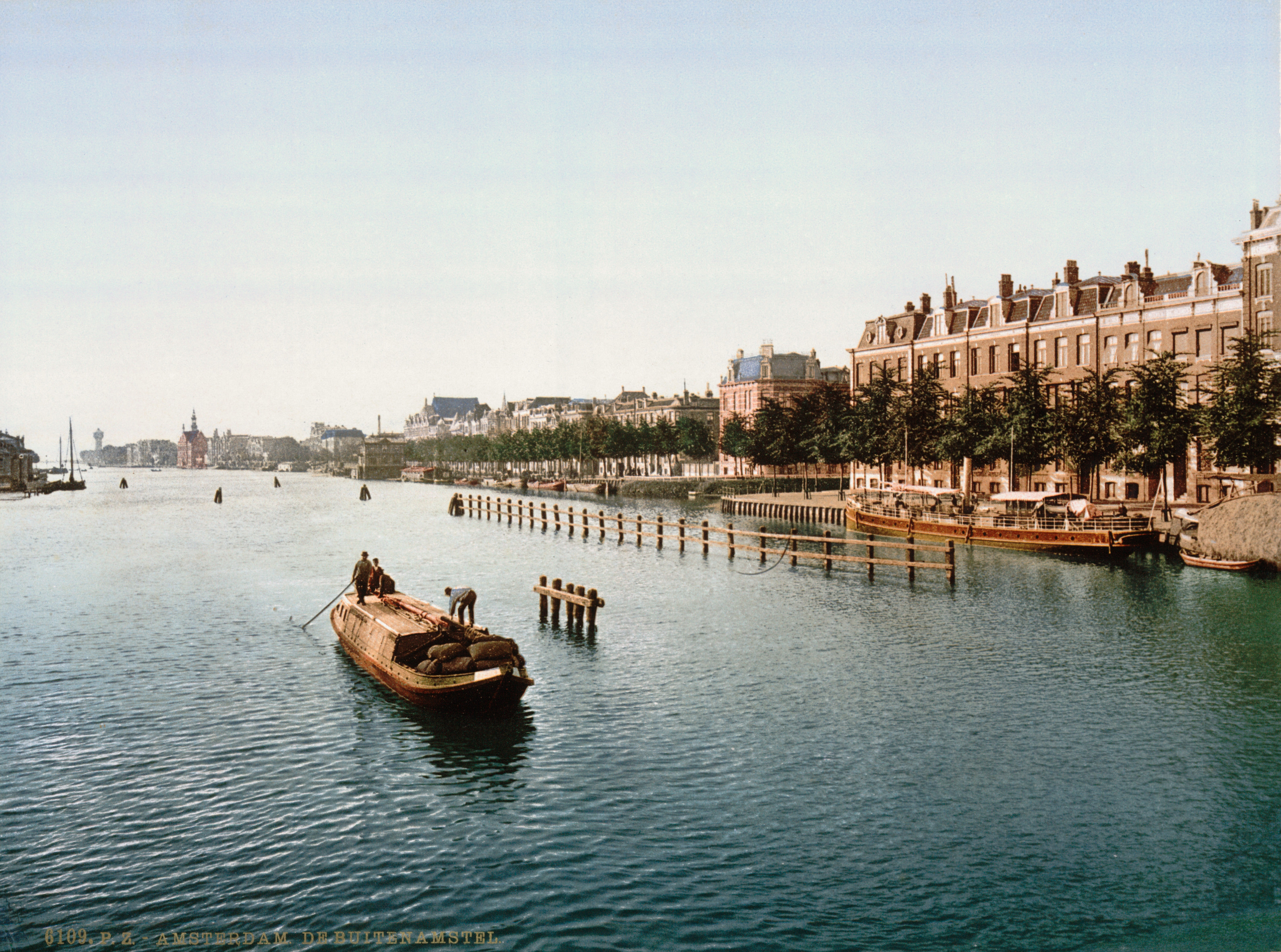 Amsterdam - De Buitenamstel